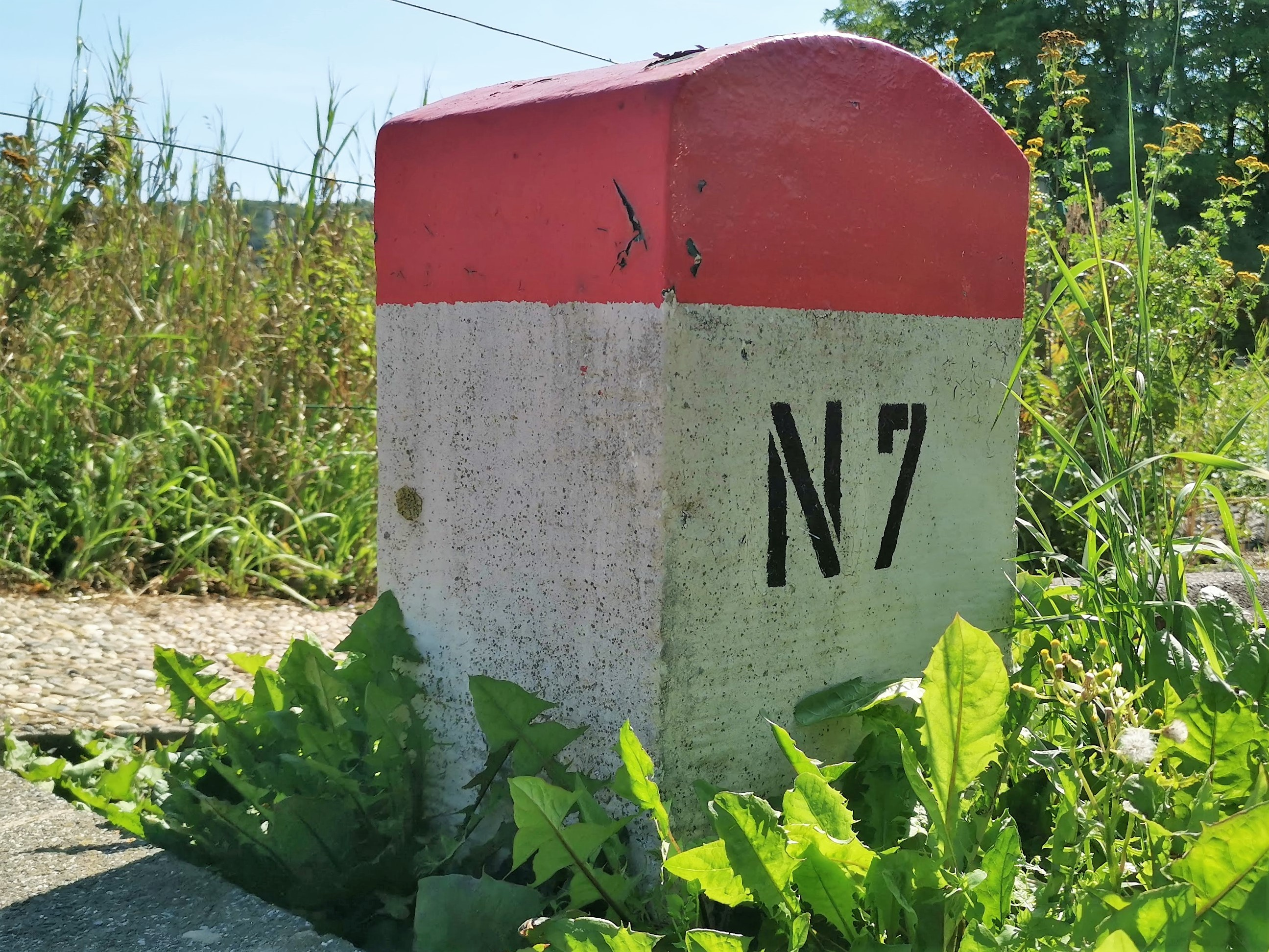 Walferdange, borne kilométrique N7